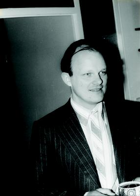 Foto di Wulf-Dieter Geyer